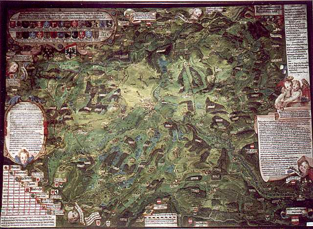 Wangener Landtafel (207 cm x 290 cm): ein Ölgemälde von Johann Andreas Rauch.